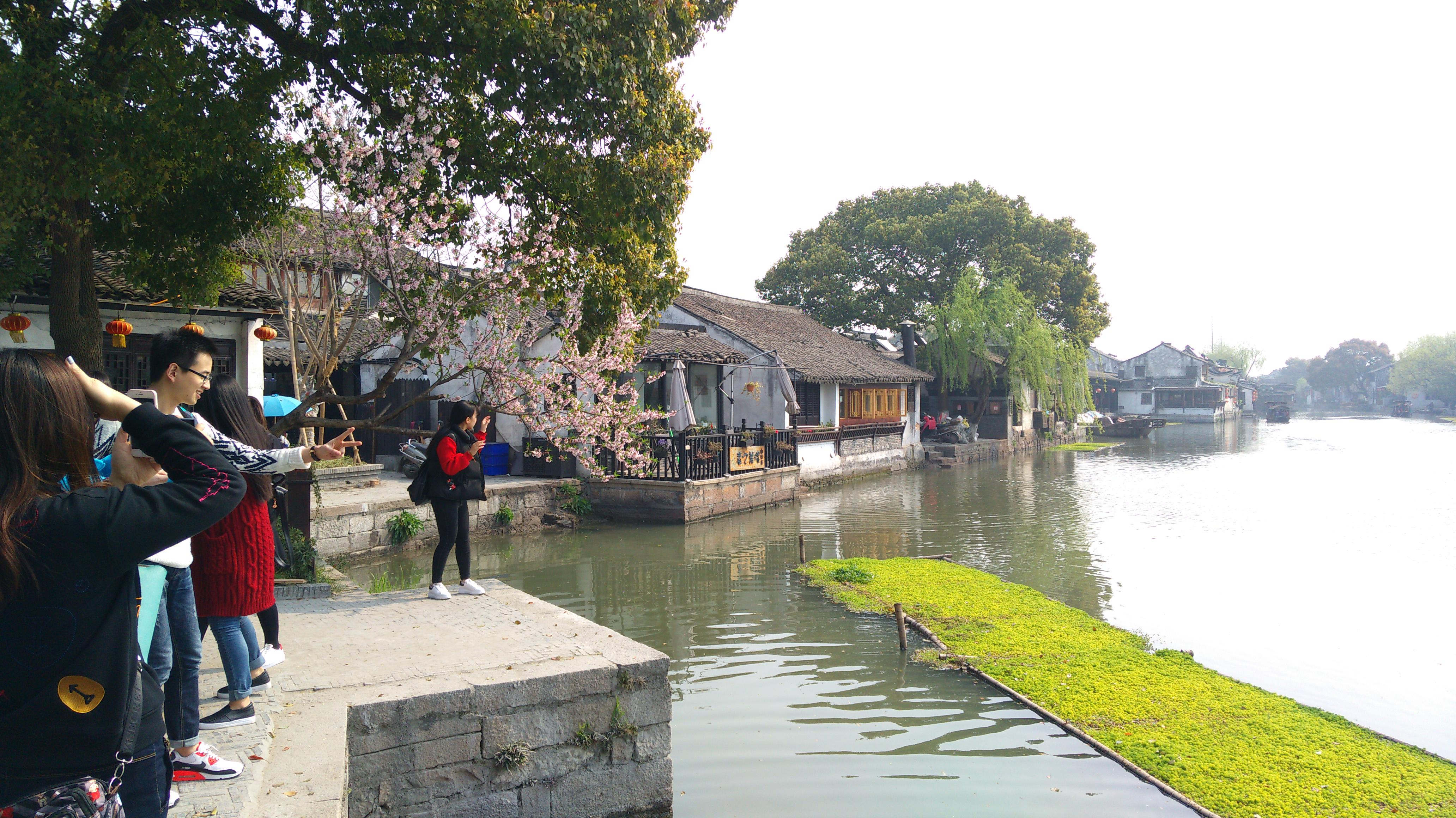 Jiashan, Jiaxing, Zhejiang, China